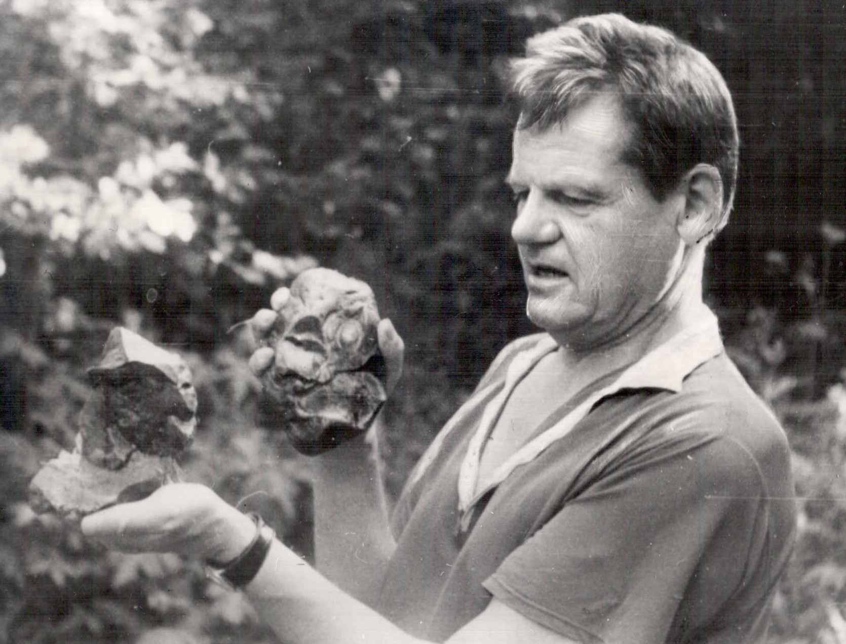 Л. Мартынов на реке Яснушке в Абрамцево. Фото В.Уткова